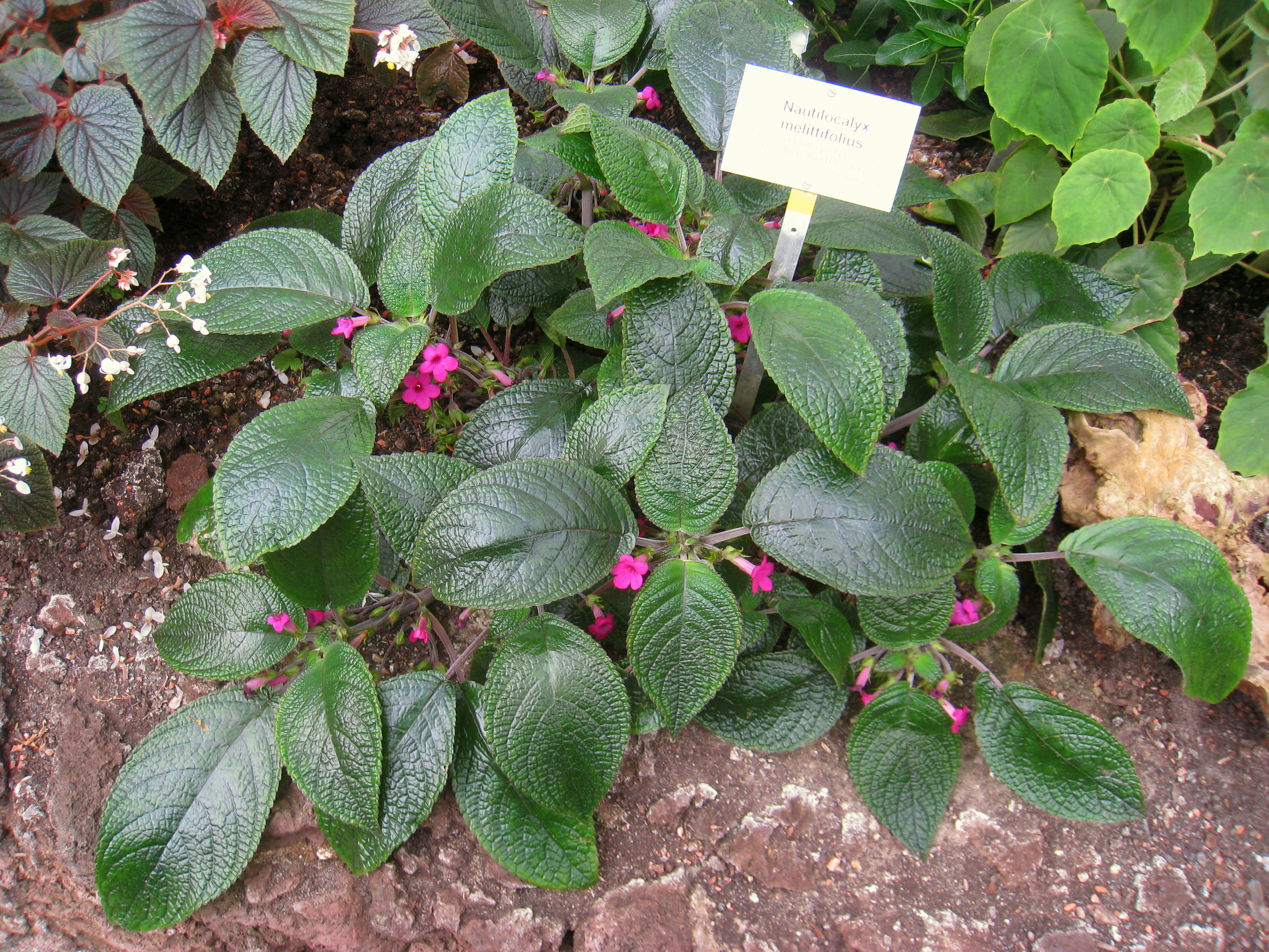 Nautilocalyx melittifolius specimen in the Botanischer Garten, Berlin-Dahlem (Berlin Botanical Garden), Berlin, Germany.